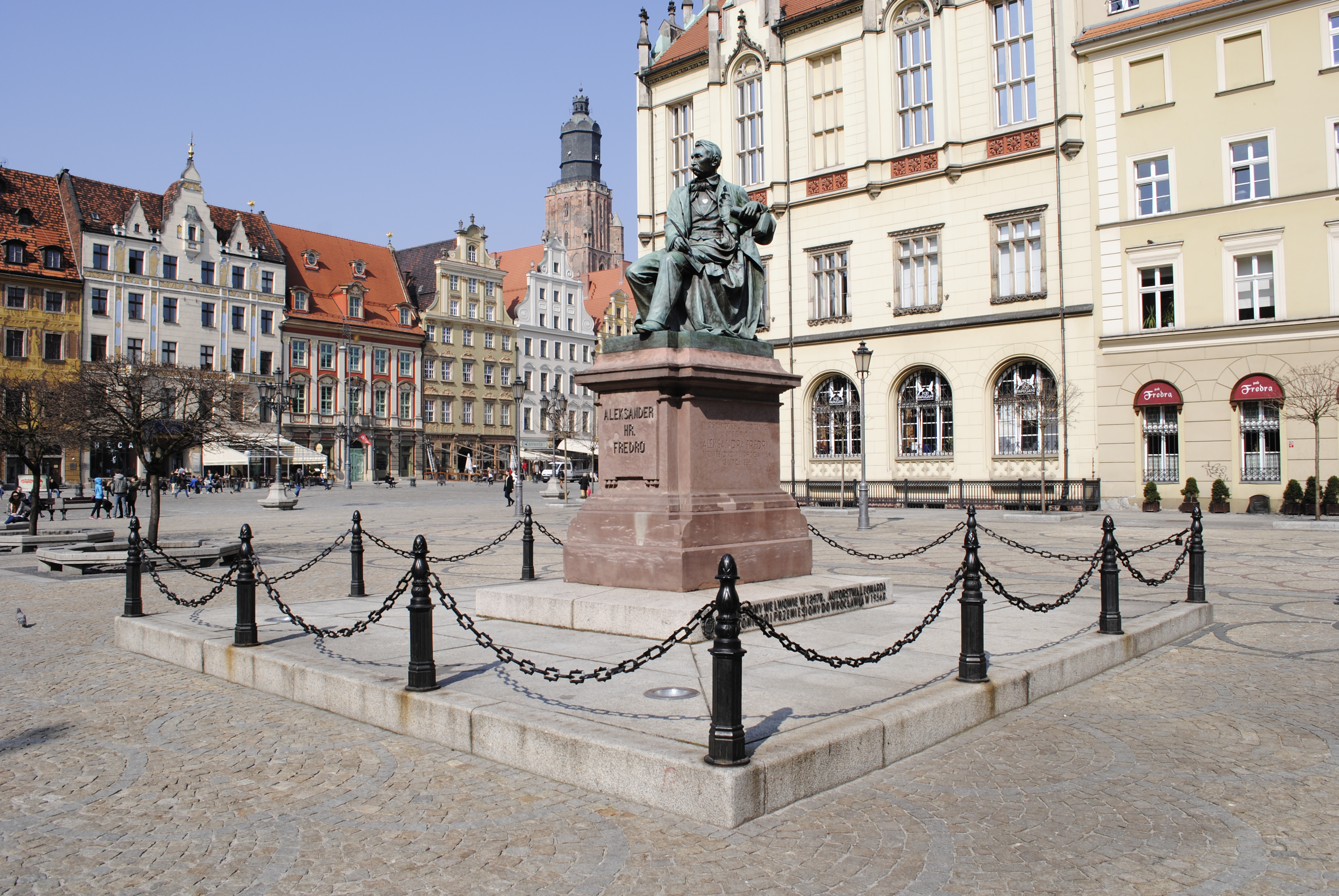 Denkmal Aleksander Fredro auf dem Großen Ring in Breslau